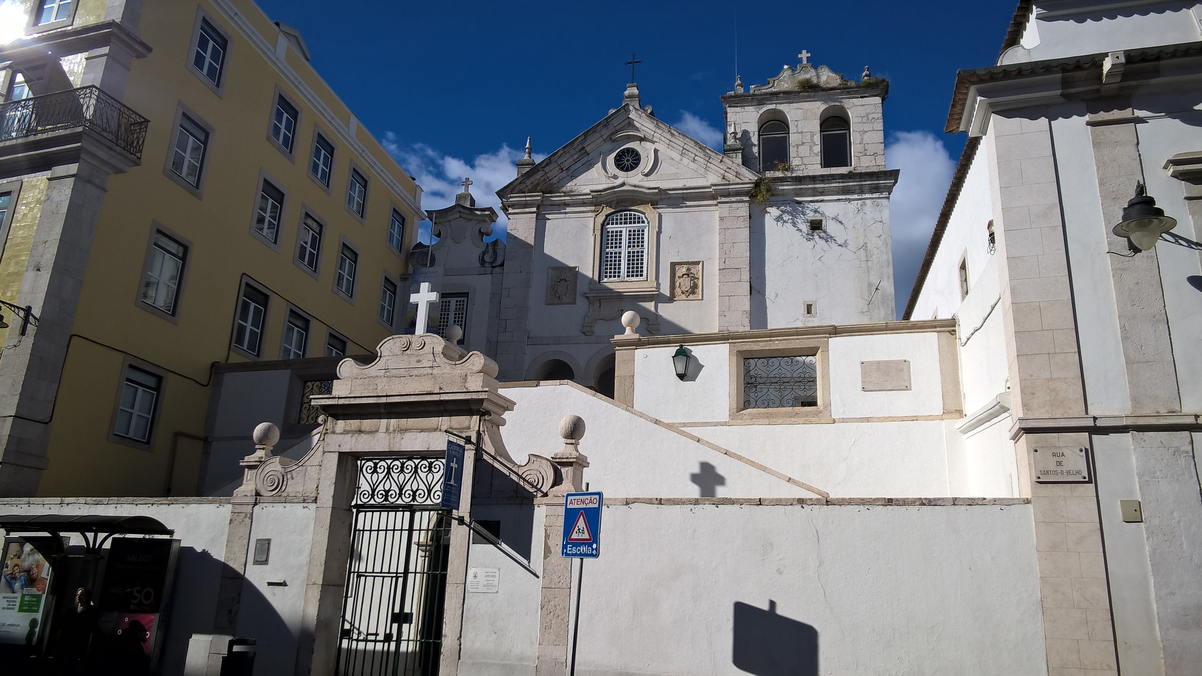 Fachada sul da Igreja Lusitana Católica Apostólica Evangélica, na rua das Janelas Verdes, em Lisboa